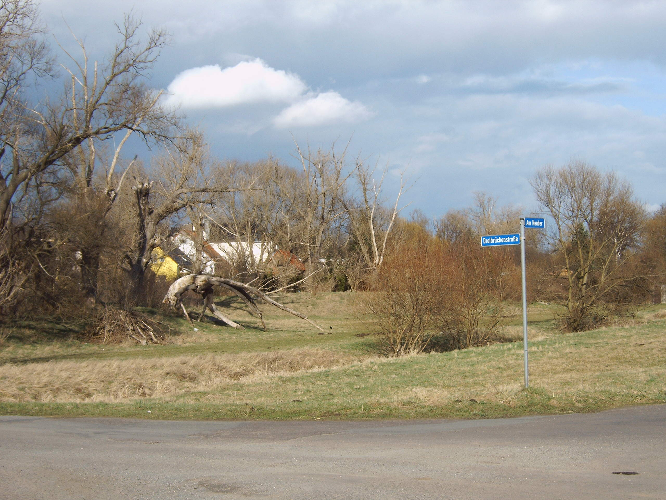 Wiese an der Dreibrückenstraße in Magdeburg-Diesdorf, Bild aufgenommen am 31.3.2006 Urheber: Olaf2